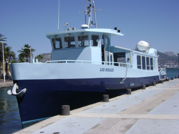 Navette maritime au Ponton de La Seyne